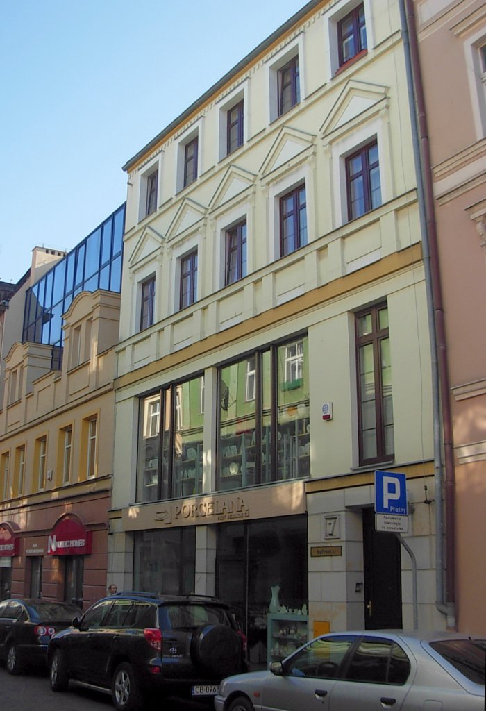 Kamienica Jezuicka 7 Bydgoszcz